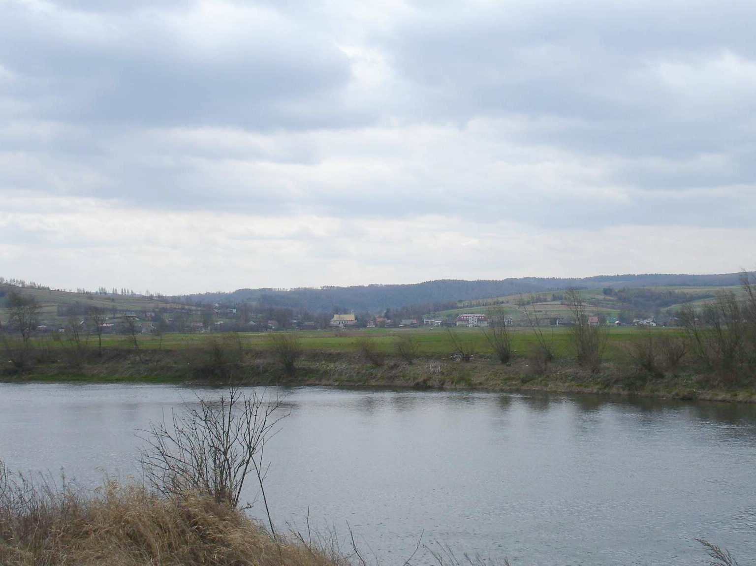 Village Pawłokoma view from Bachórz